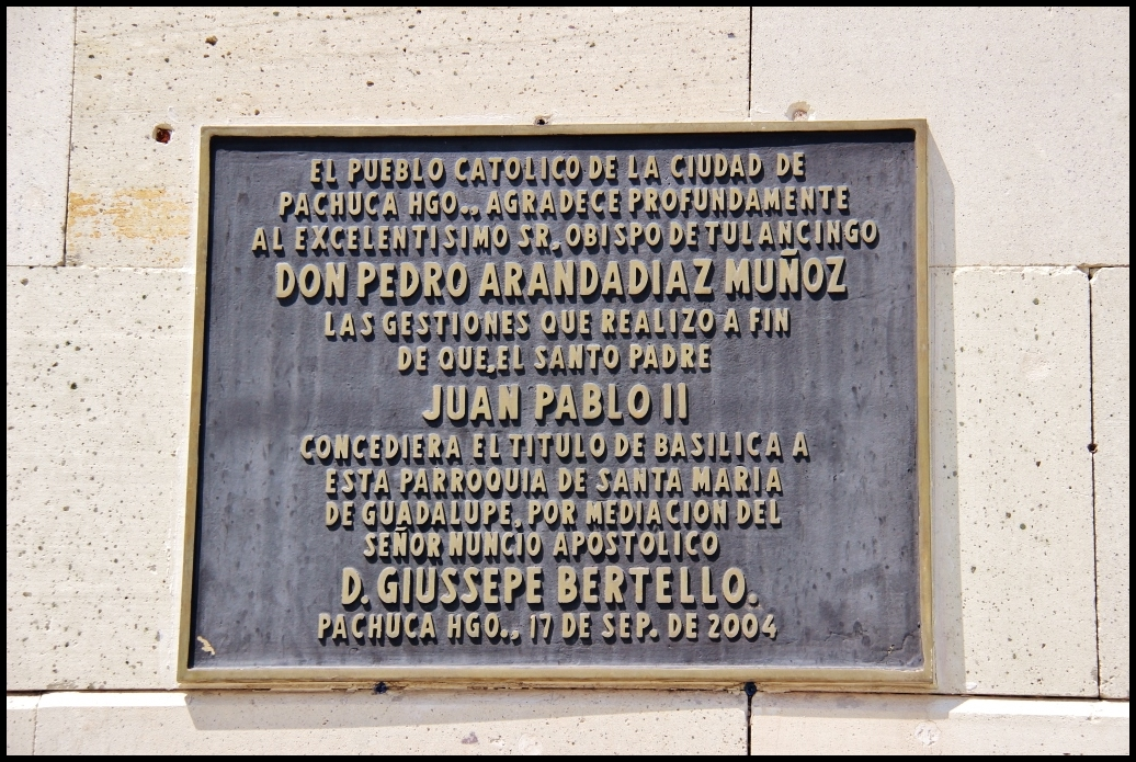 Basilica de Santa María de Guadalupe (Pachuca) Estado de Hidalgo,México